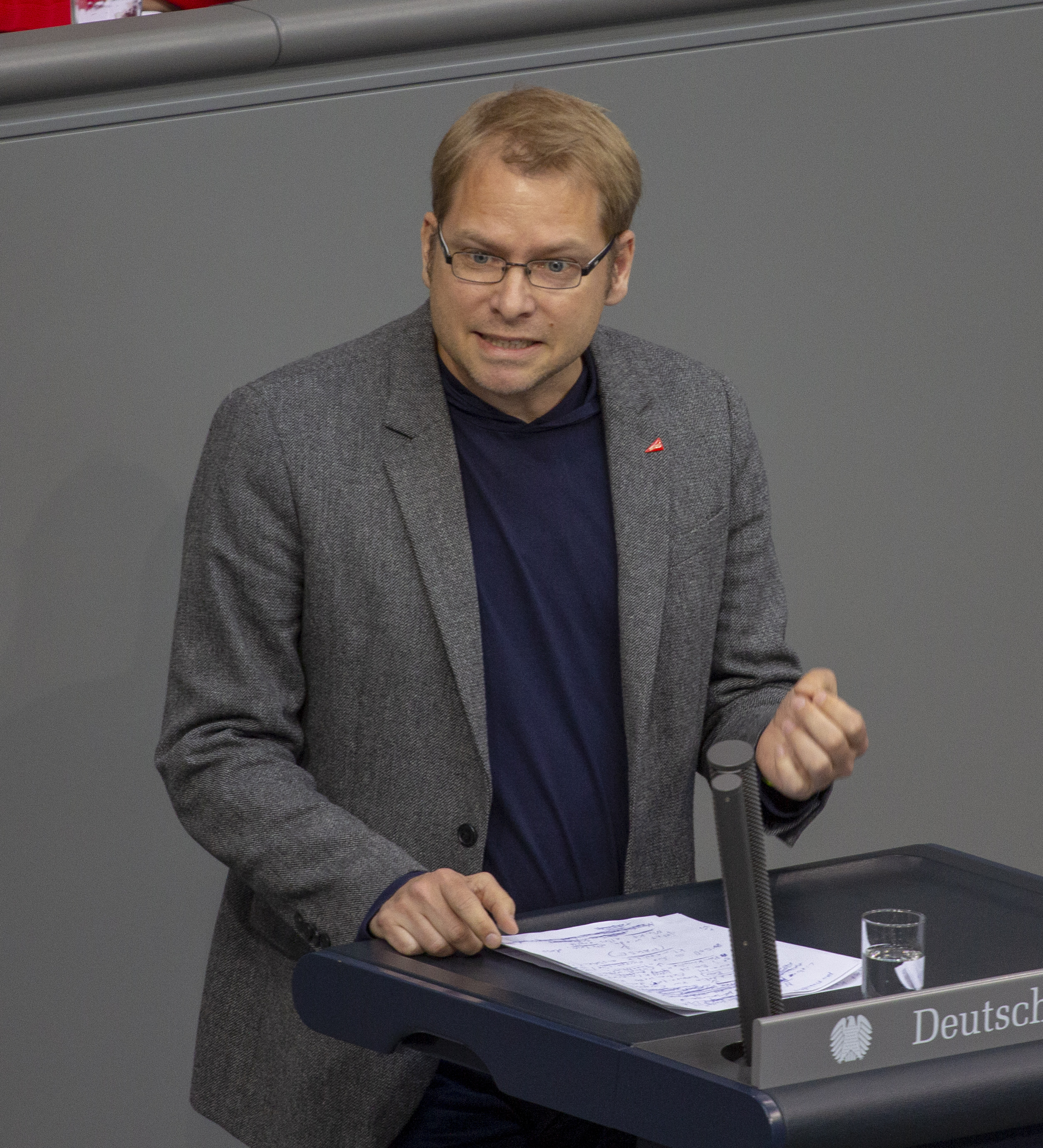 Plenarsitzung des Deutschen Bundestages am 9. Mai 2019 in Berlin.